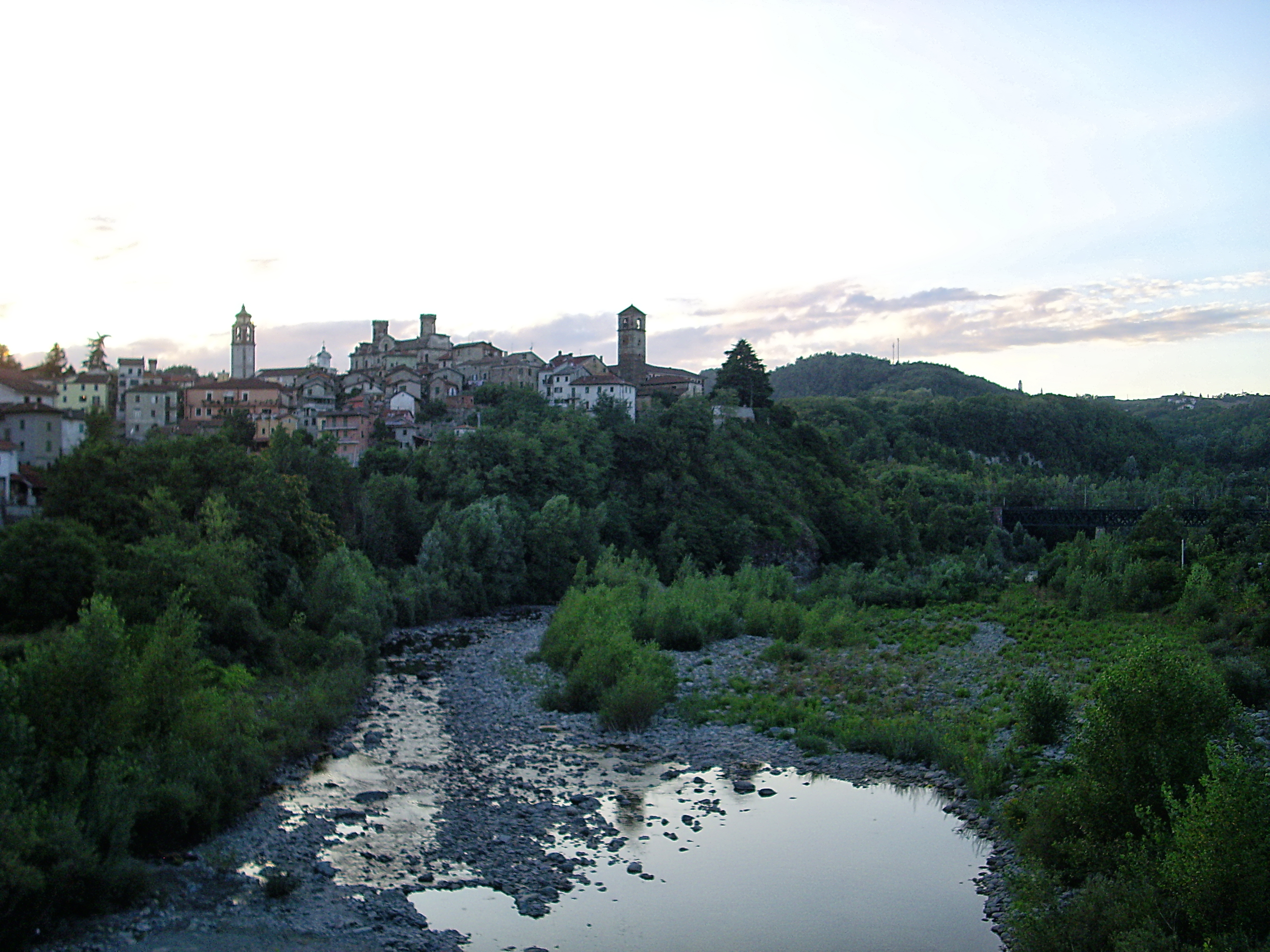 Molare, in provincia di Alessandria. In primo piano il torrente Orba.